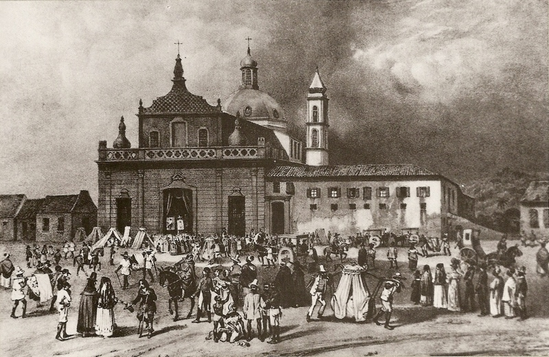 Igreja do Hospício de Nossa Senhora da Piedade da Bahia (litogravura s/ papel, 25,5 x 21 cm)